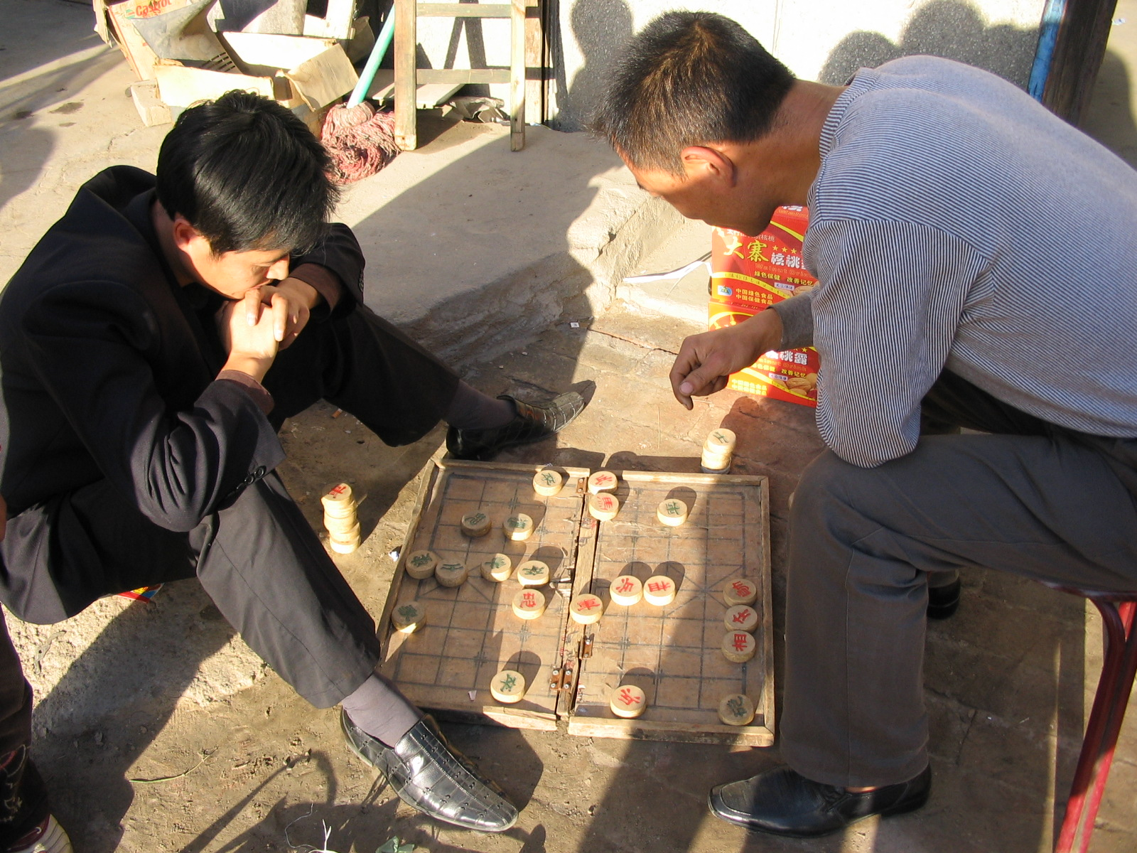 Chinesen beim Xiangqi spielen inDatong